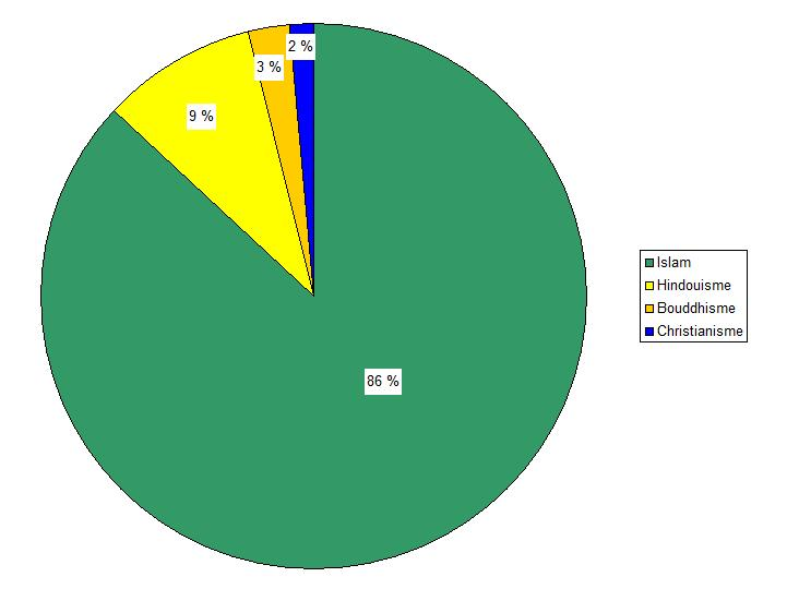 Religions dans le district de Chittagong, division de Chittagong, Bangladesh.